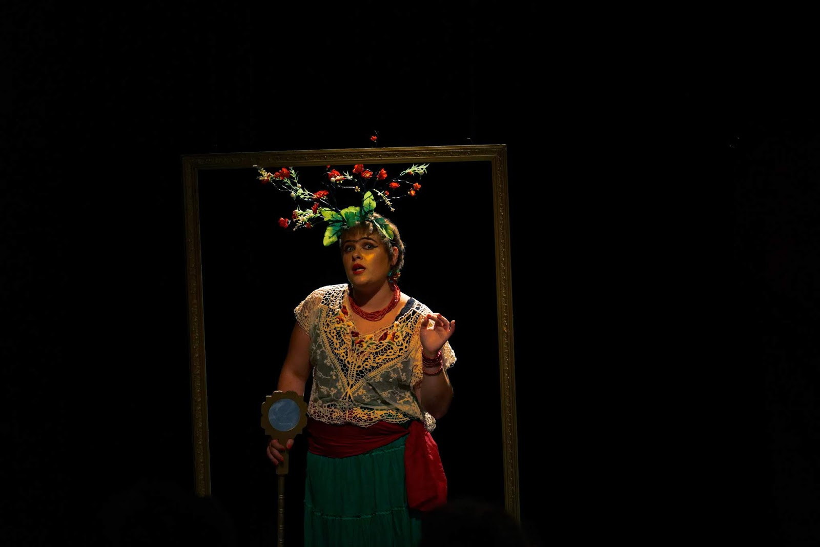 Espectáculo Não Kahlo, das Produções D. Mona.